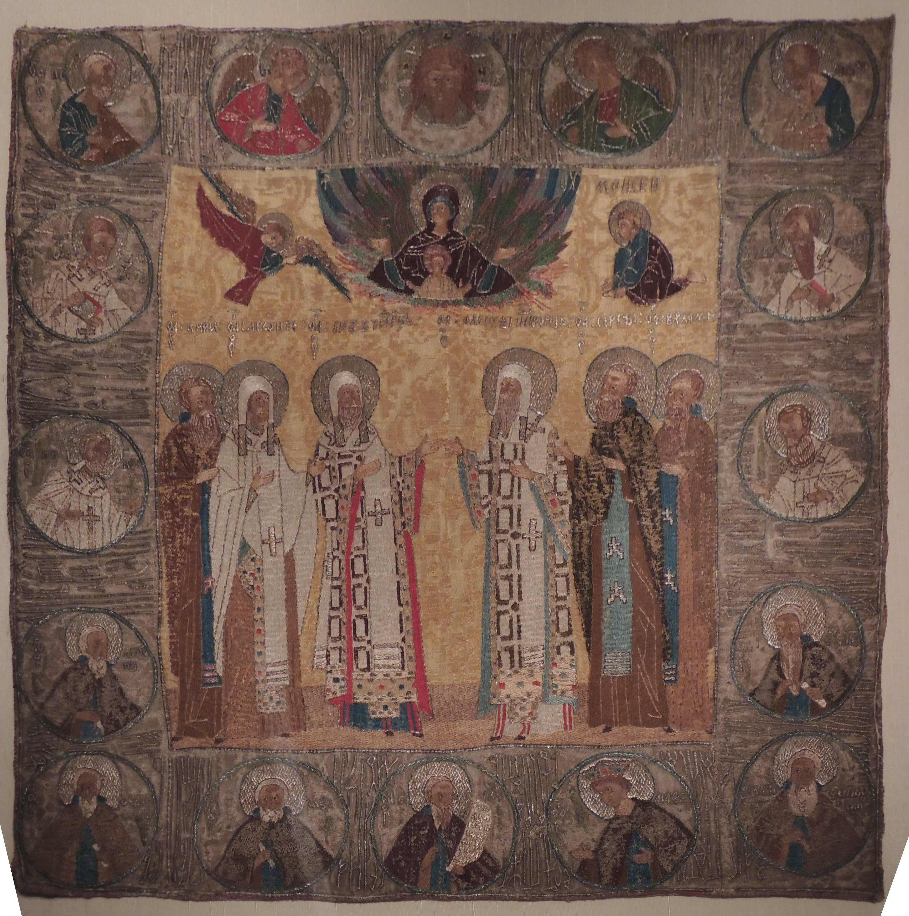 Выставка "Великий князь и государь всея Руси Иван III"